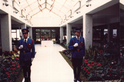 Kuća Cveća ou "la Maison des Fleurs" est le nom du mausolée de Tito à Belgrade